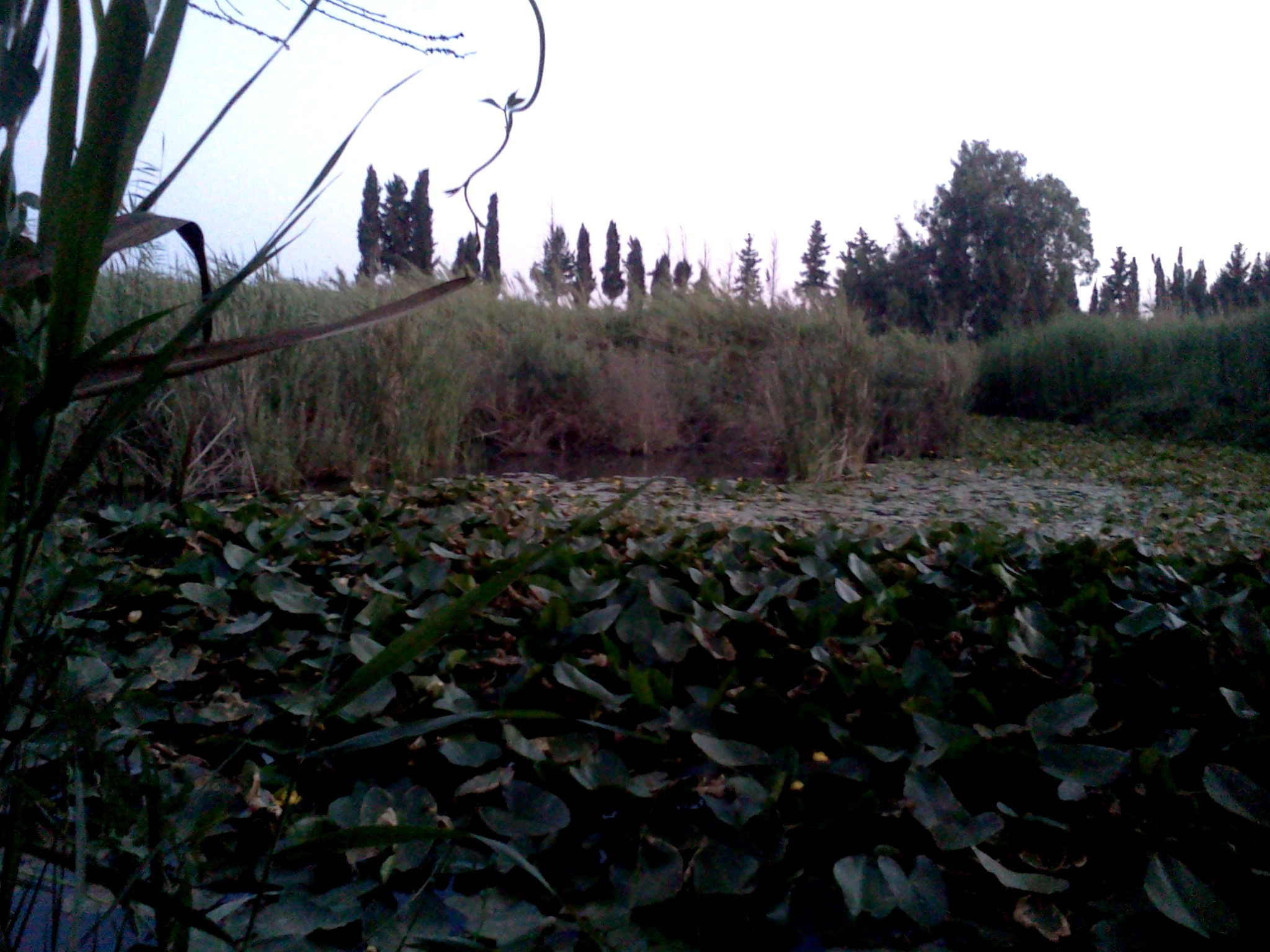 סיומה של תעלת עינת בבריכת הנופרים